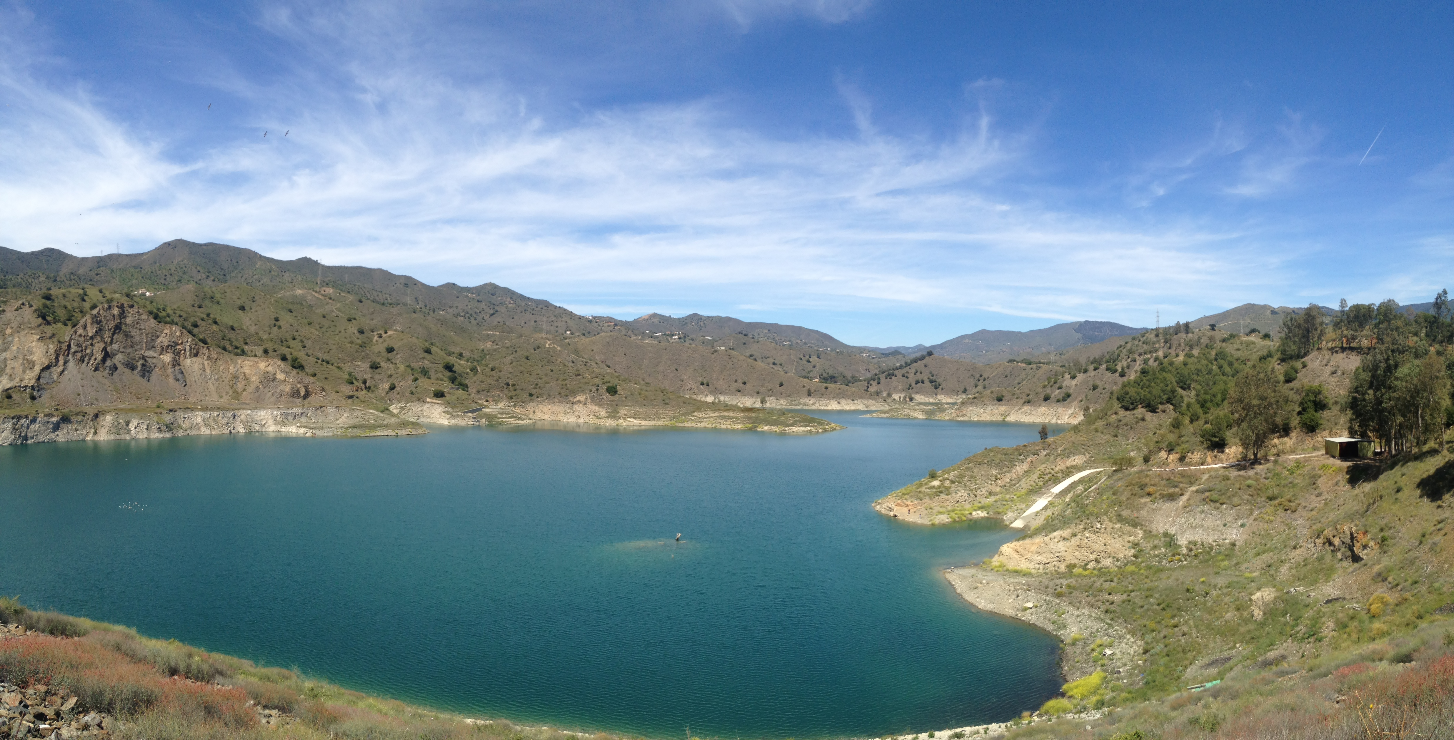 Embalse De El Limonero cerca de Málaga, Andalucía, España